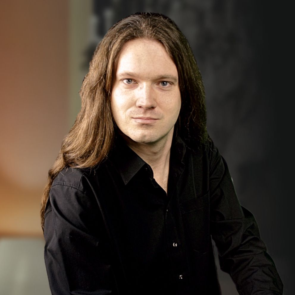 Ronny Matthes